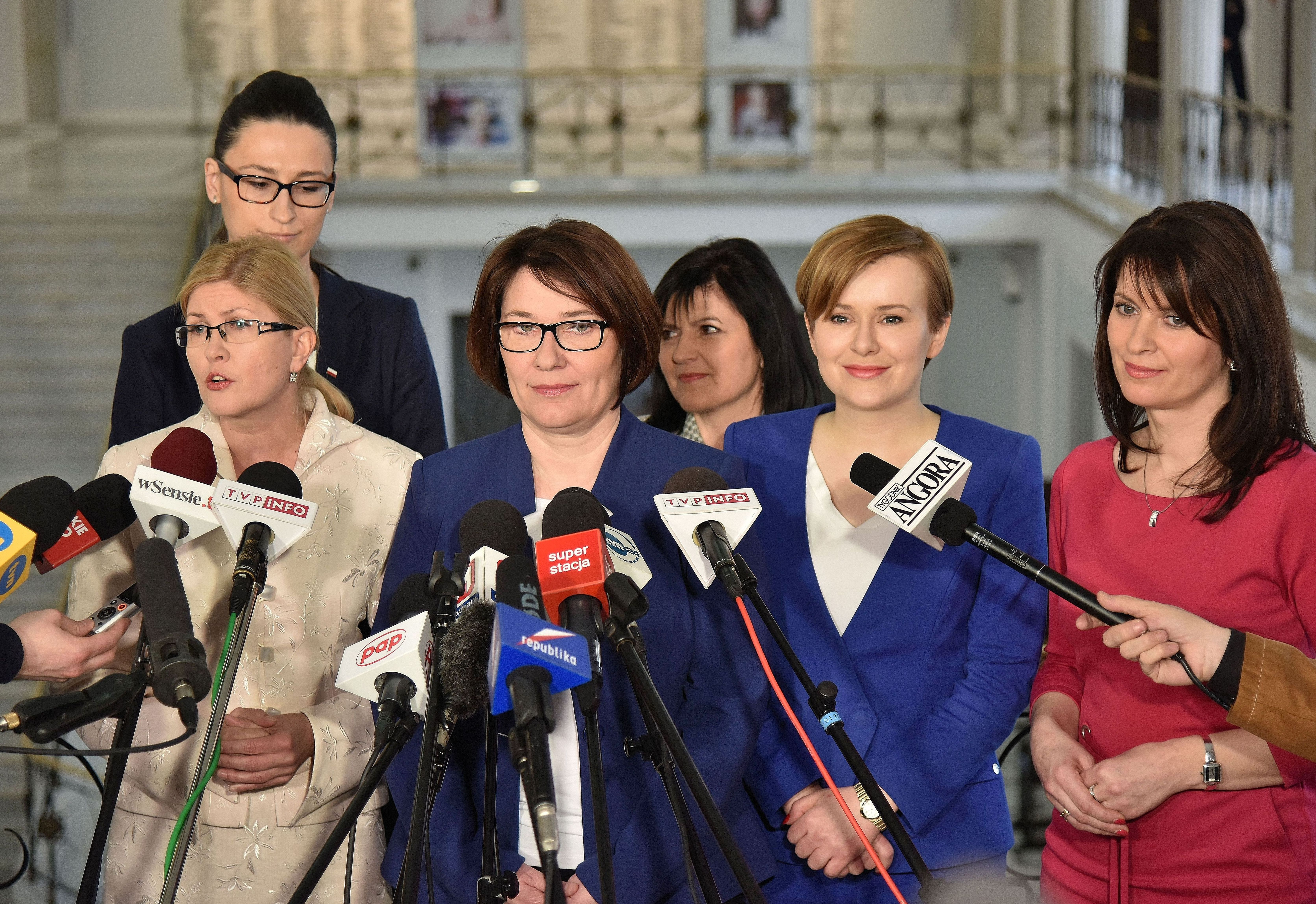 Posłanki (od lewej): Iwona Arent, Małgorzata Golińska, Beata Mazurek, Urszula Rusecka, Anna Krupka i Ewa Kozanecka podczas konferencji prasowej w Sejmie.